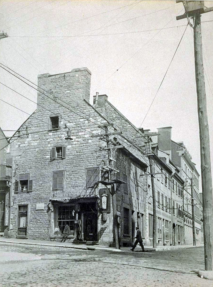 401, rue Saint-Paul Est. La maison vers 1910. L’épicerie est alors tenue par A. Laudendeau; à gauche l’affiche laundry devant la partie droite de l’adjonction arrière, annonce l’établissement de Mark Sing. Bibliothèque et Archives nationales du Québec, Albums de rues E.Z. Massicotte, 7-83-a.